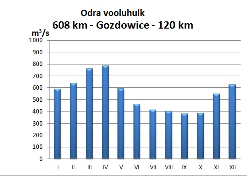 See on Odri jõe hüdrograaf.